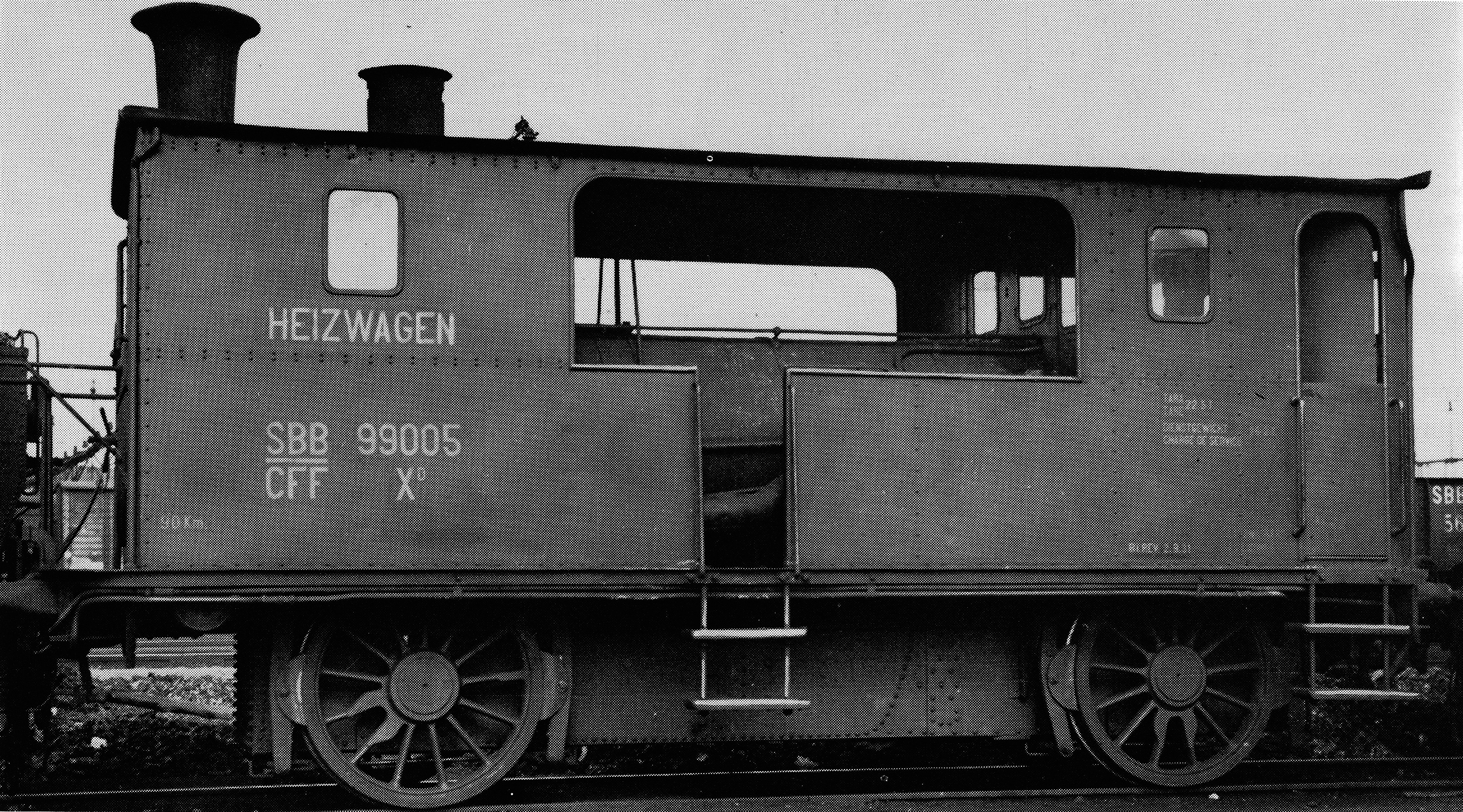 Heizwagen XD 99005 der Schweizerischen Bundesbahnen, 1920 umgebaut aus Lokomotive Ec 2/2 Nr. 6082, bis 1902 E 2 Nr. 81 der Vereinigten Schweizerbahnen, gebaut 1885 durch die Maschinenfabrik Esslingen (Fabr.-Nr. 2110); 1942 abgebrochen.